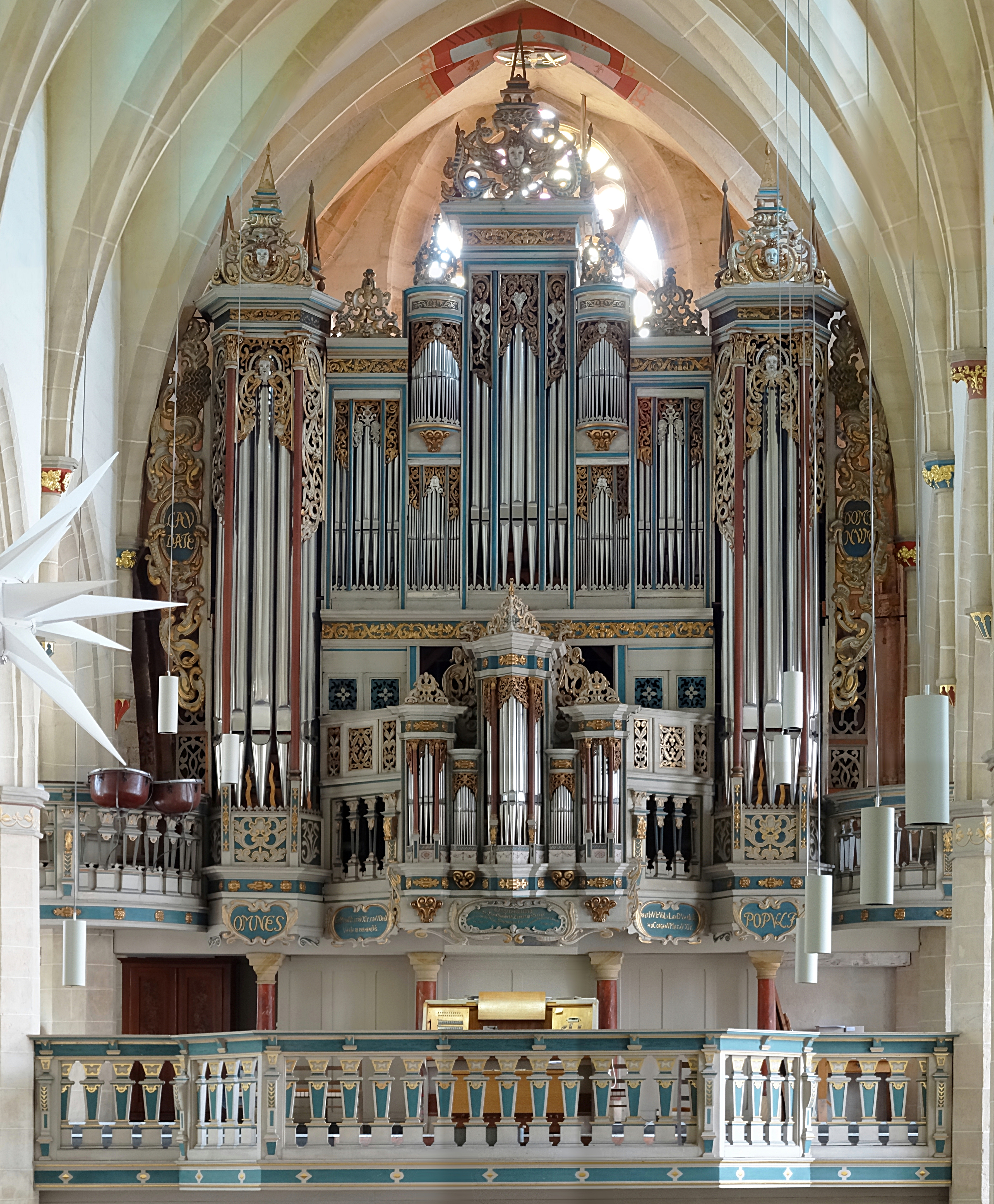 Predigerkirche in Erfurt, Orgel von Alexander Schuke (1977) hinter dem barocken Prospekt von Ludwig Compenius (1648)